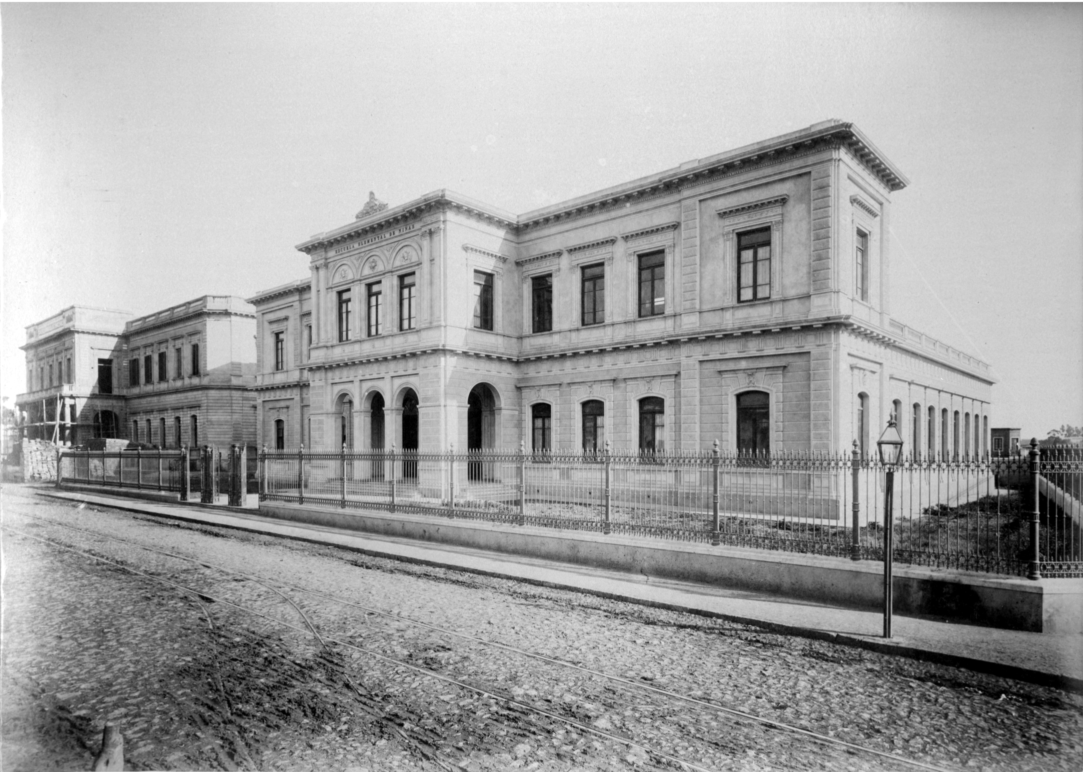 Edificio escolar de dos plantas construido sobre la calle Caridad, actual General Urquiza, esquina Alsina (actual Escuela General Zapiola). Un friso sobre el primer piso identifica el establecimiento: "Escuela Elemental de Niñas". Hacia la izquierda el edificio escolar todavía se encuentra en la etapa de construcción (Escuela Mariano Acosta), mostrando pilas de ladrillos y andamios varios. Se encuentra rodeado por una reja perimetral de hierro ; sobre la vereda de la calle Caridad se ubica un farol de iluminación nocturna y, la calle de empedrado irregular, muestra las vías de una linea de tranvías a caballo. Fotografía: Samuel Boote.